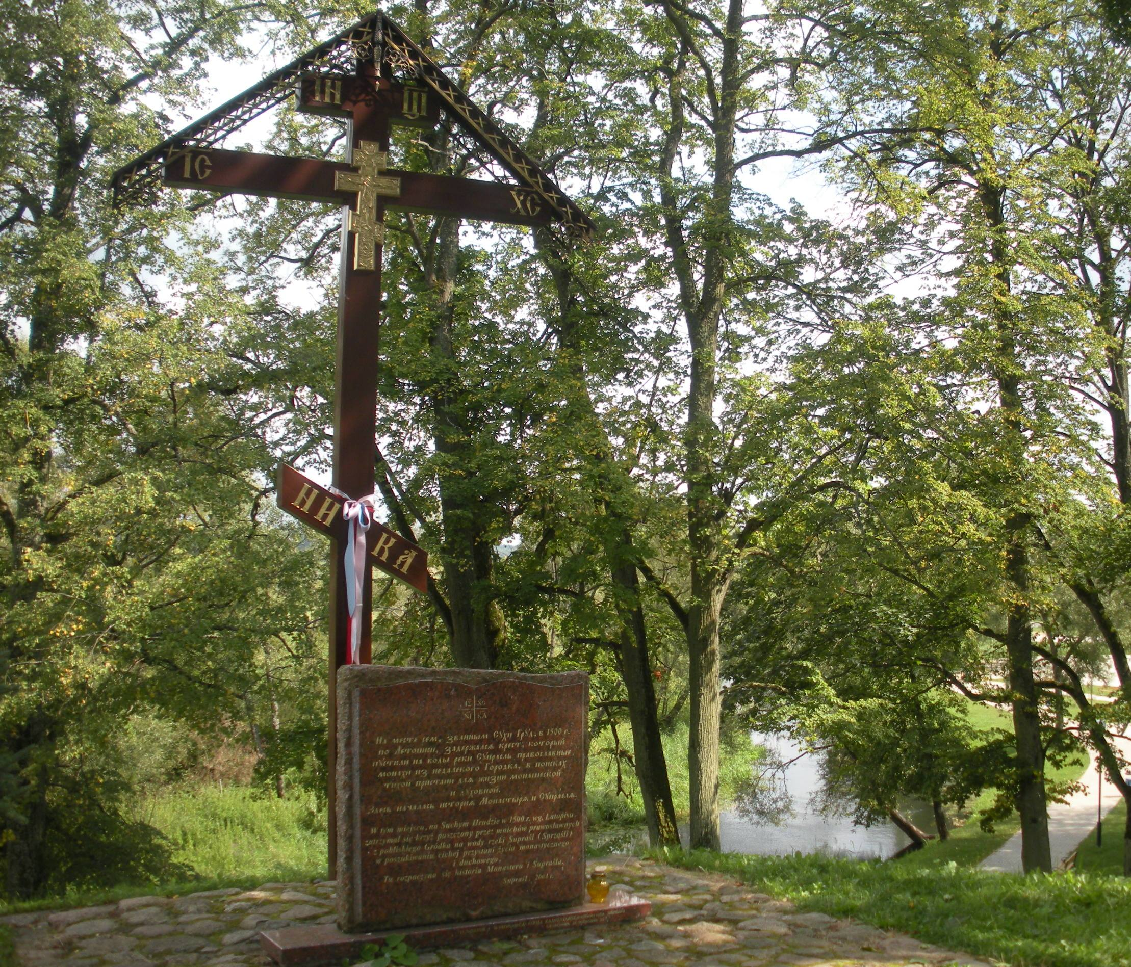 Krzyż i tablica pamiątkowa między monasterem a rzeką w Supraślu